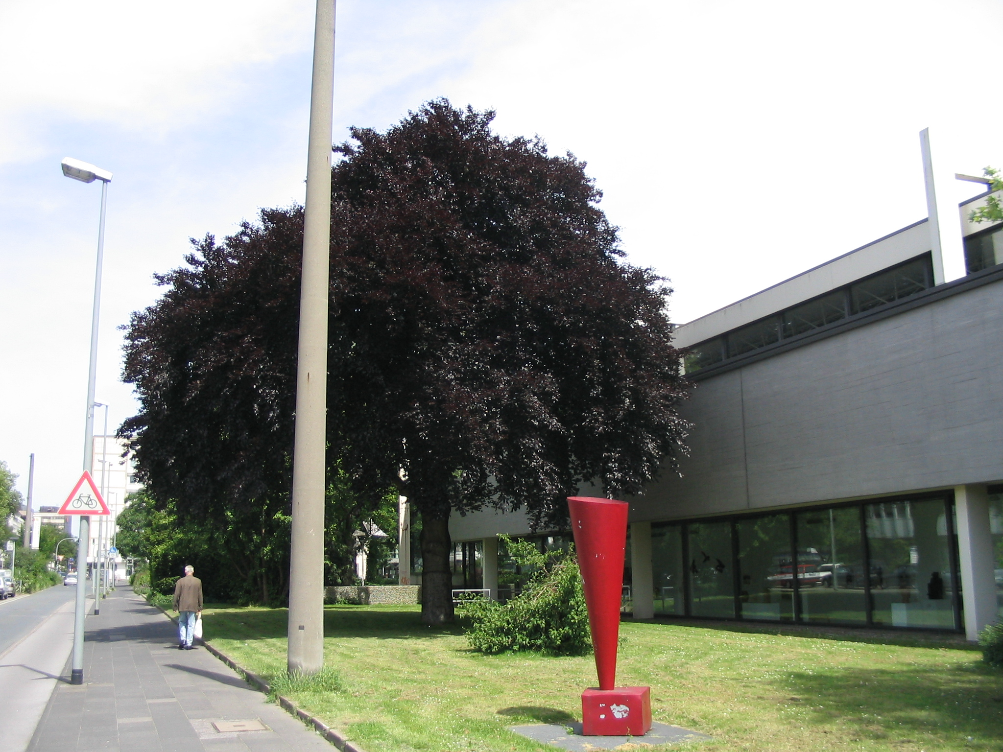 Ein Baum vor dem Lehmbruck Museum in Duisburg